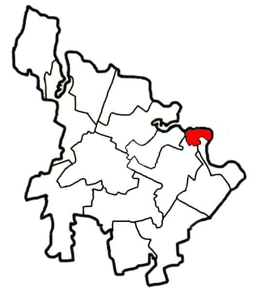 Верхньодніпровський район